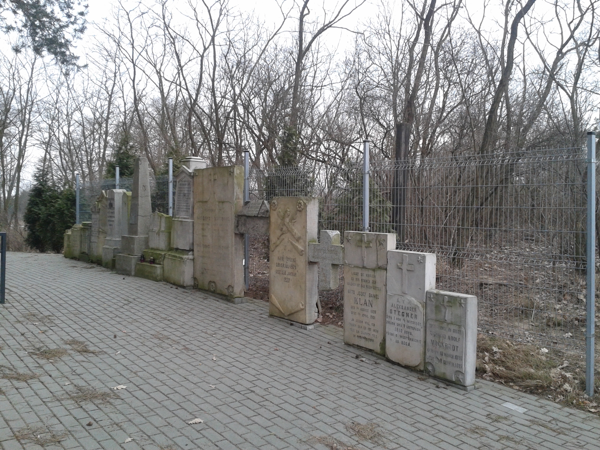 Cmentarz Ewangelicki w Augustówku, dzielnica Białołęka ul. Ruskowy Bród